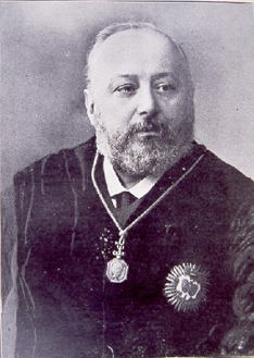 Ilmo. Sr. Don Octavio Cuartero. Portada de "Vida Manchega", nº 49 (1913)